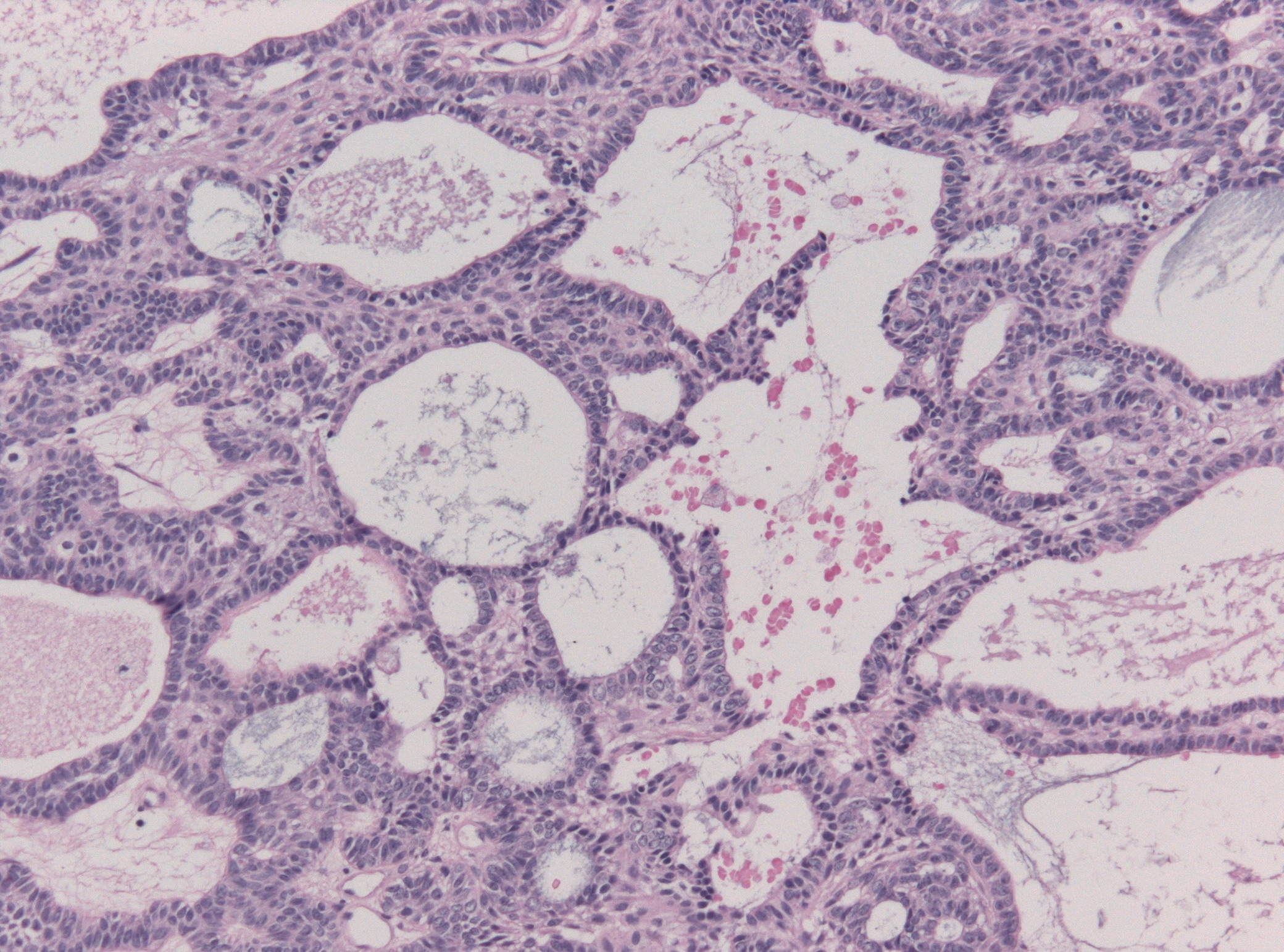 Adamantinous Craniopharygioma